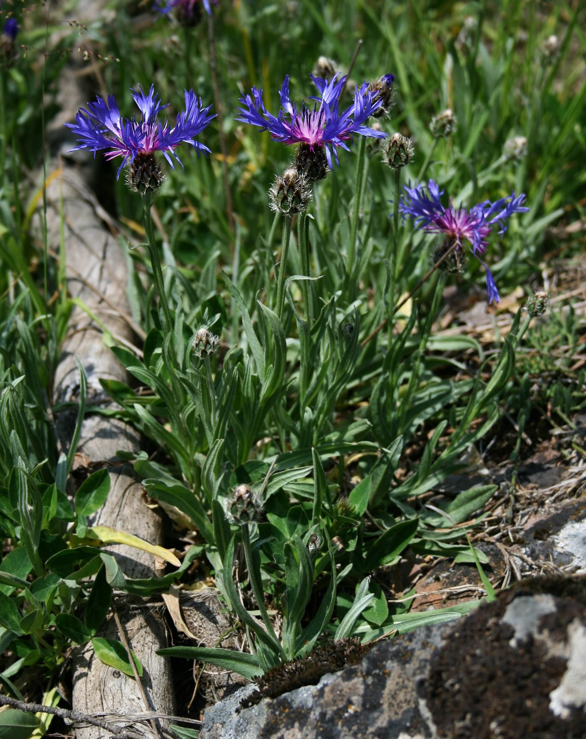 Cyanus triumfettii (= Centaurea triumfettii), Korbblütler (Asteraceae) - Türkei/Türkiye/Turkey: Prov. Bolu/Bolu ili, Köroğlu Dağları, 19-20 km S Bolu, an der Straße nach Kıbrıscık, 1450-1500 m